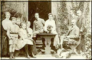 Rodzina zu Dohna-Schlobittenow w 1914 r.